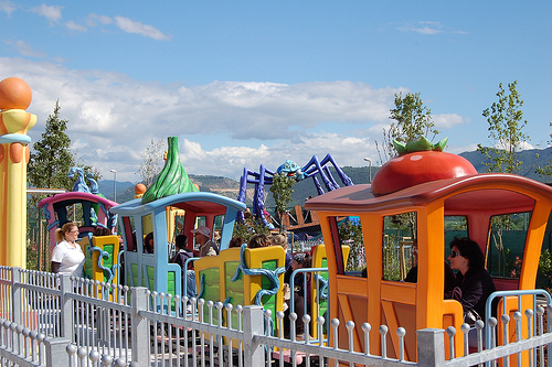 Pixie Train